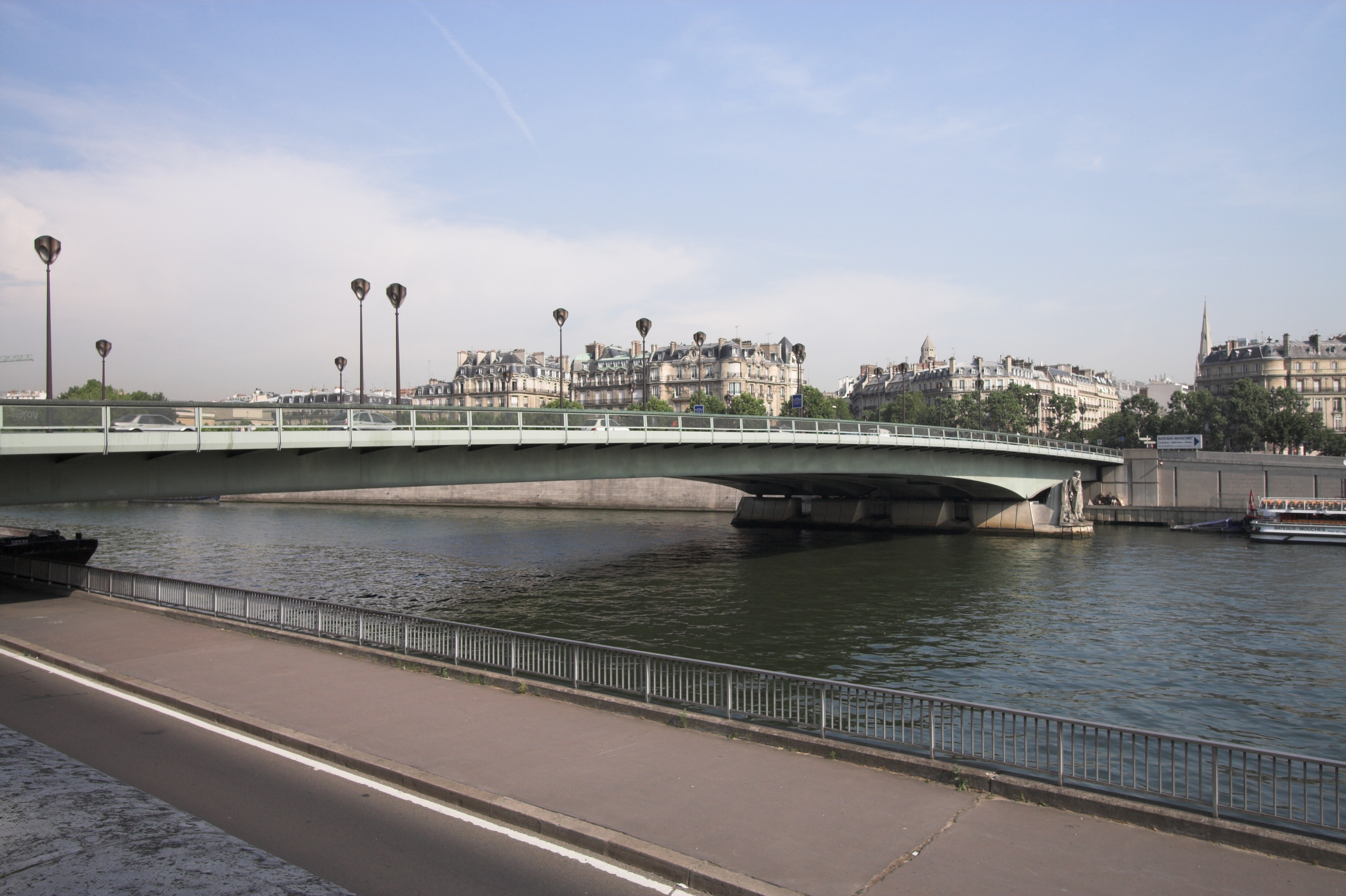 Pont de l'Alma(Paris, France)